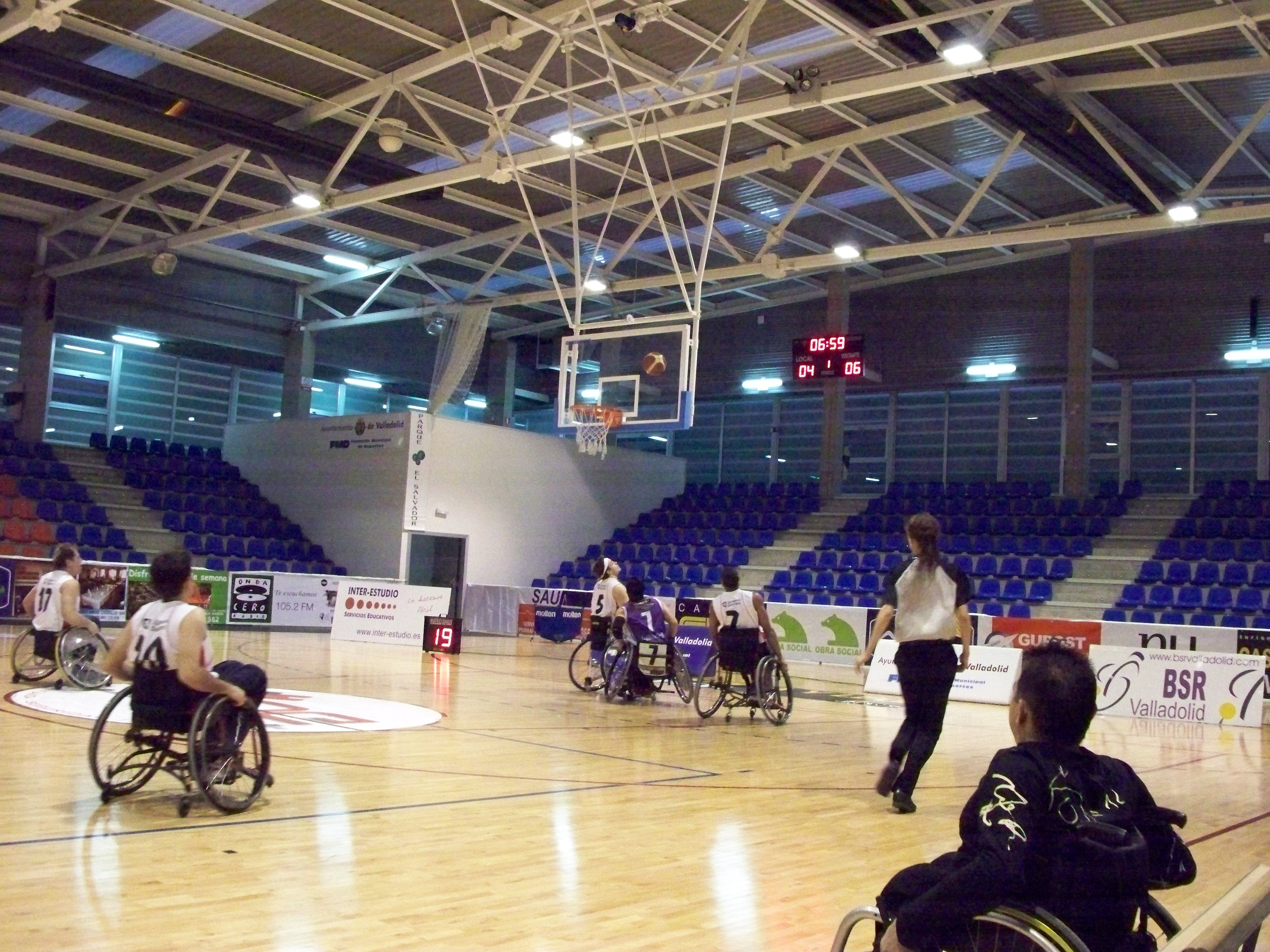 El fallecido entrenador Juan de la Cruz dirigiendo a sus hombres.